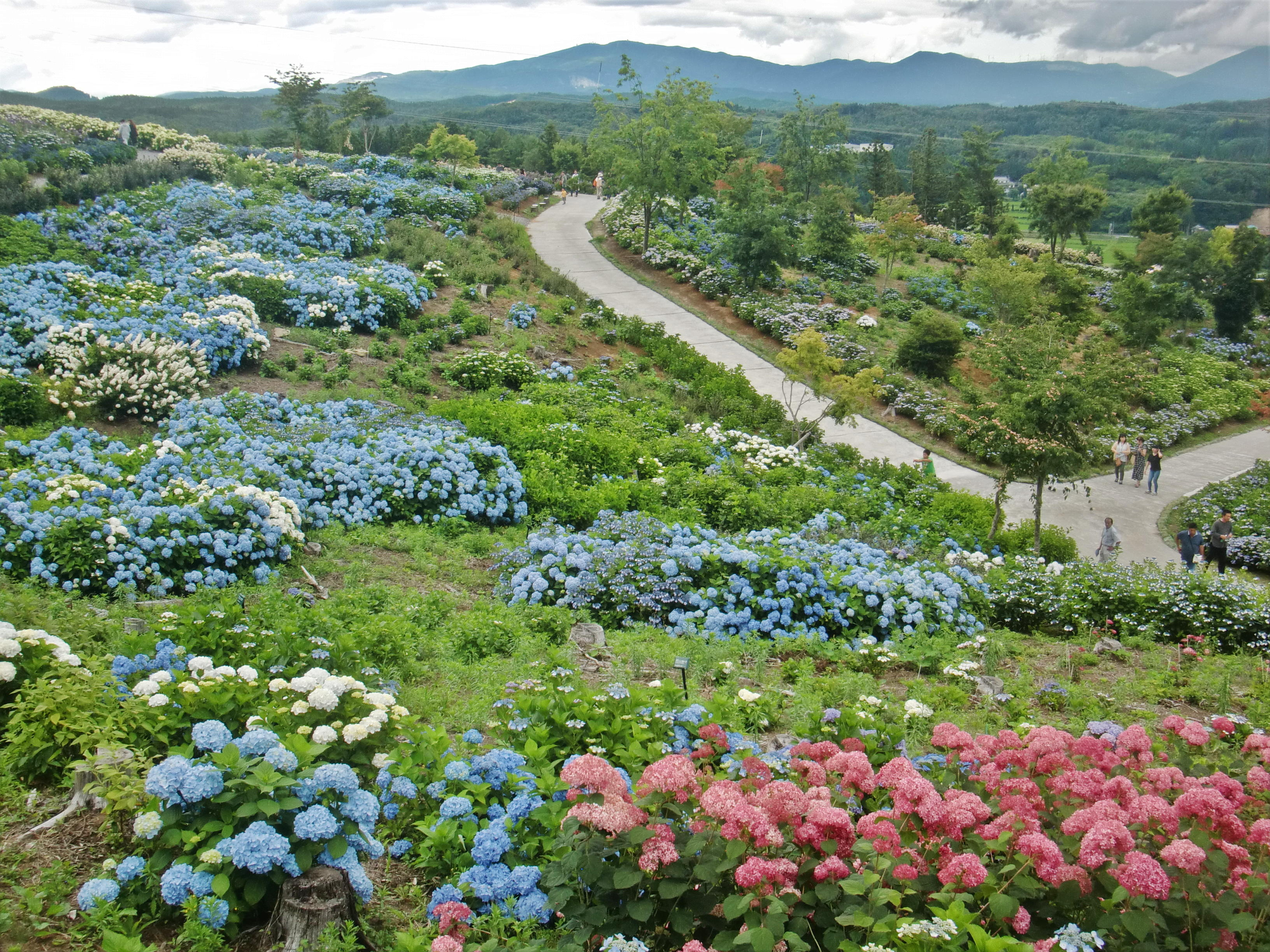 ジュピアランドひらた あじさい園